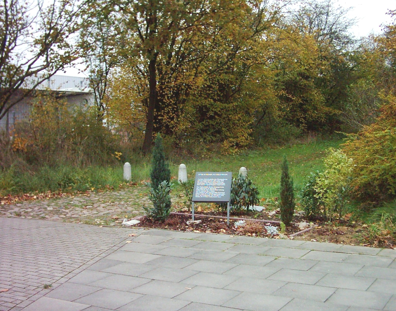 Tafel des ehemaligen Schießplatzes Höltigbaum, Hamburg-Rahlstedt, Gewerbegebiet Höltigbaum. Siehe auch Image:Tafel Schießplatz Höltigbaum02.jpg